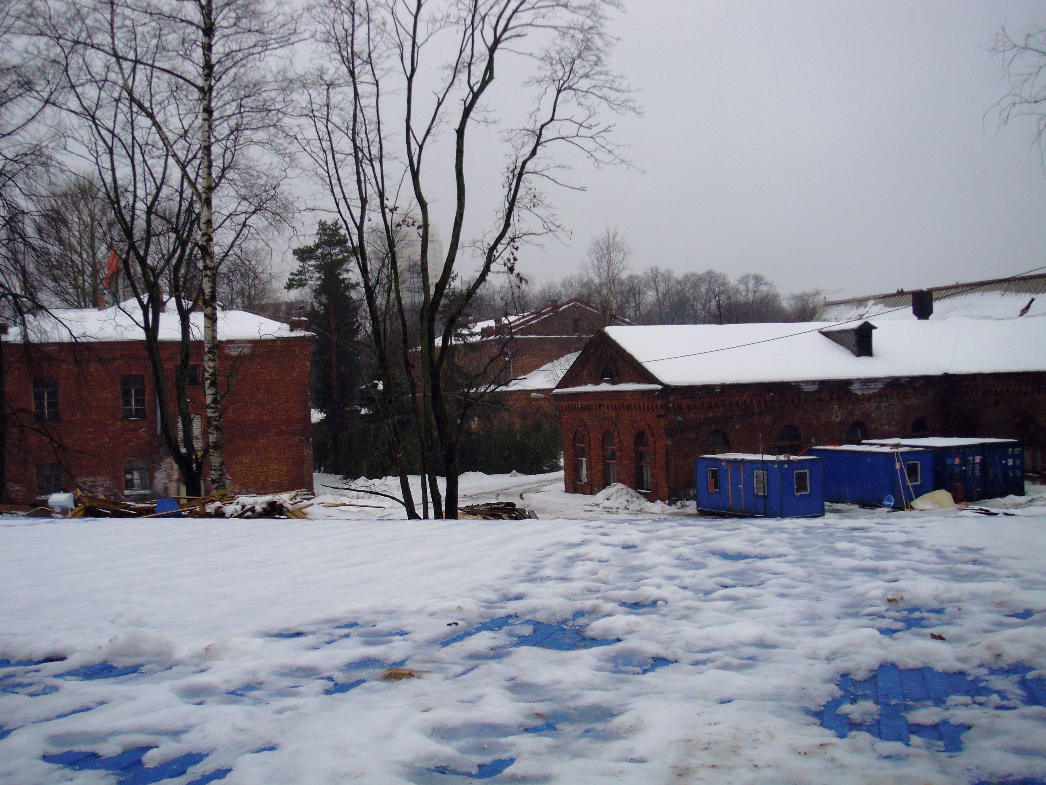 Сестрорецк СПб. Инструментальный завод им. Воскова С.П. Состояние зданий завода в 2013 году.